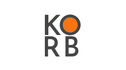 Skaut-Korbo